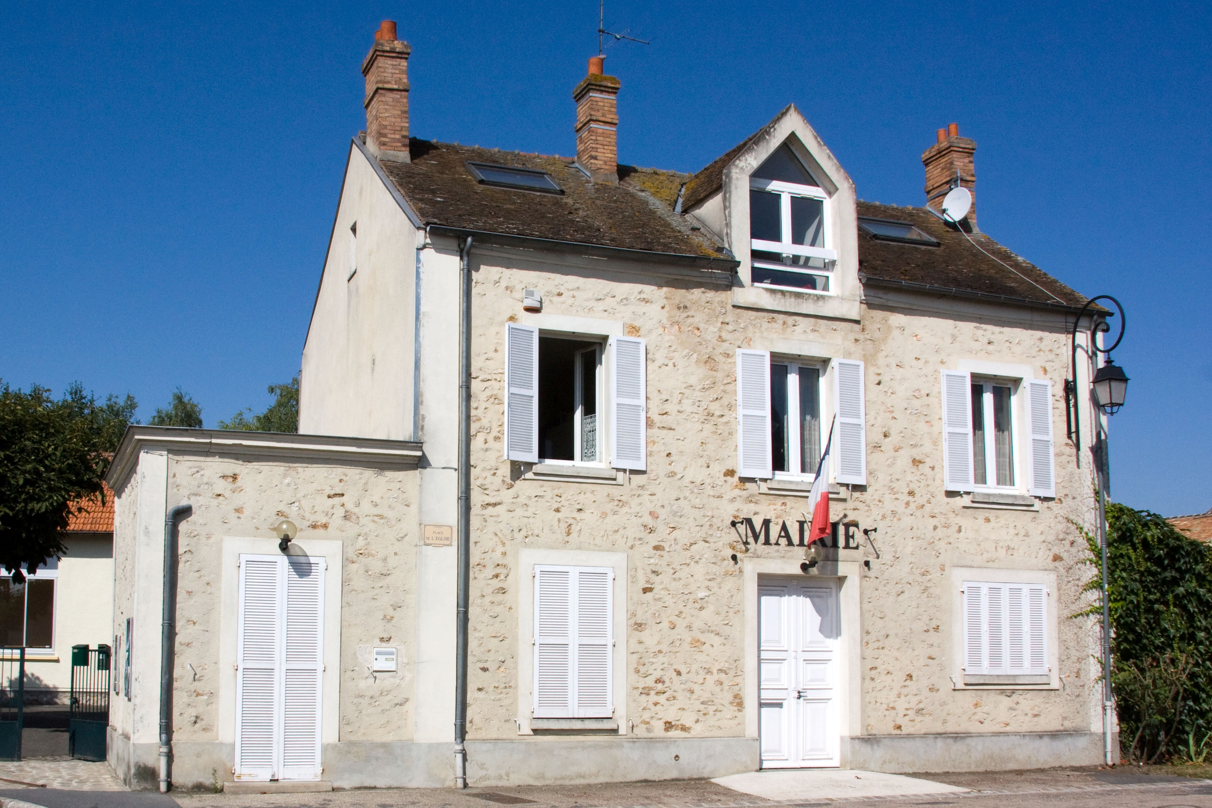 Mairied'Auvernaux, Auvernaux, Essonne, France